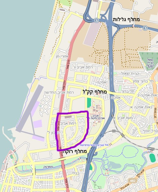 Ramat Aviv, Tel Aviv